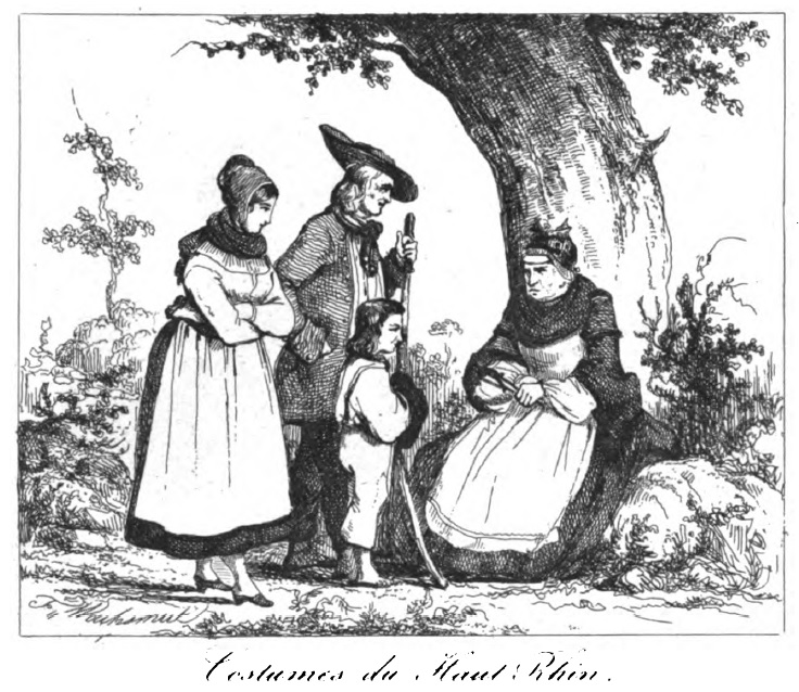 Costumes du Haut-Rhin.